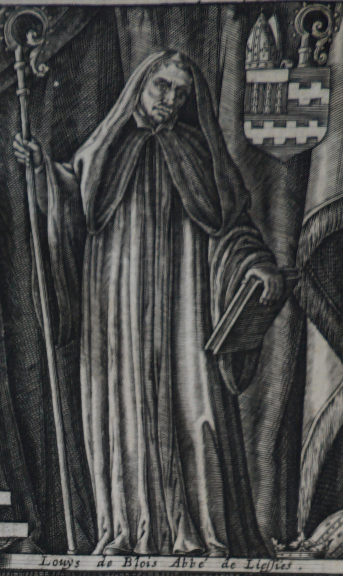 dessin issue de "histoire de chatillon" par Du Chesne.